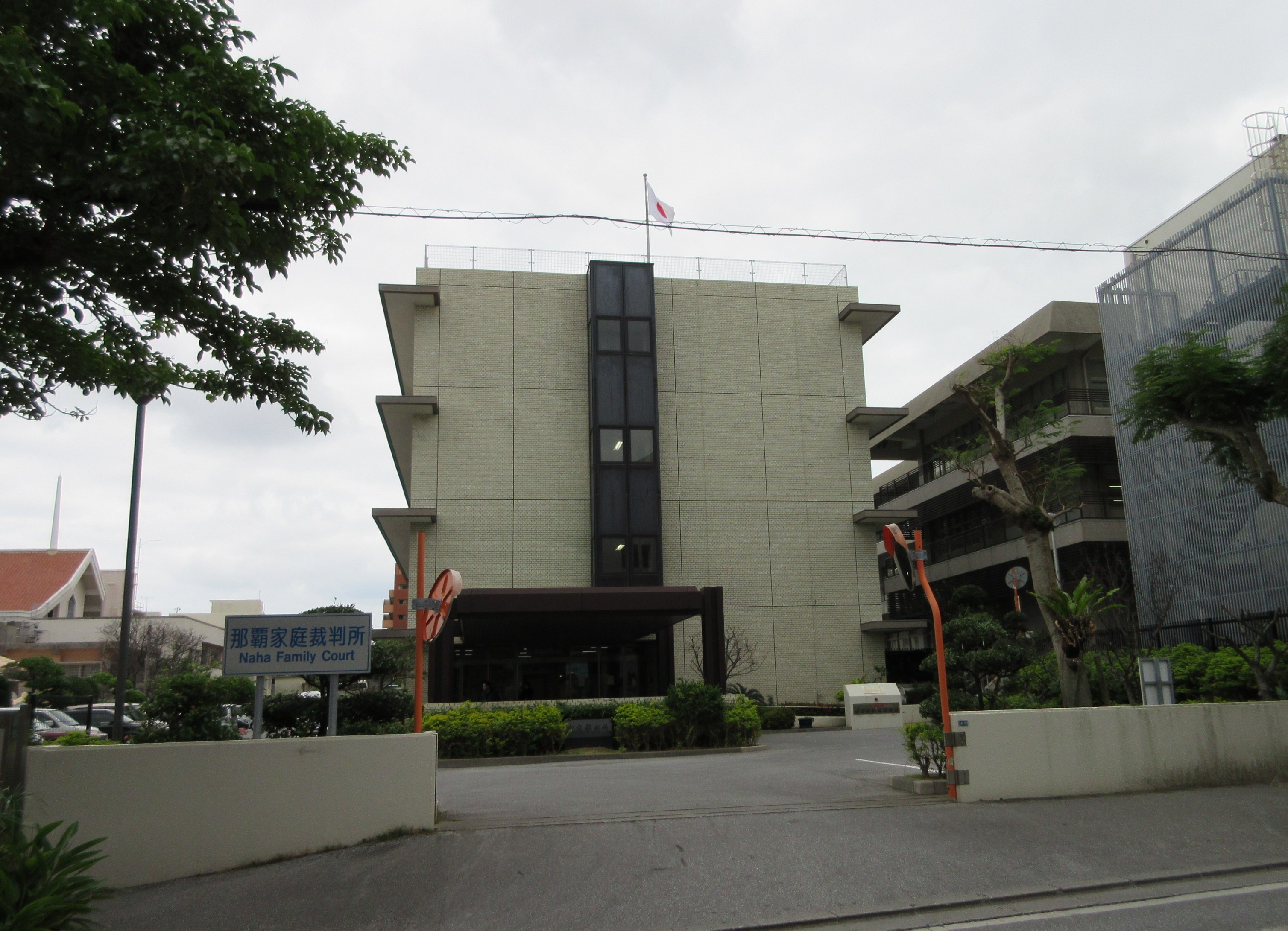 那覇家庭裁判所